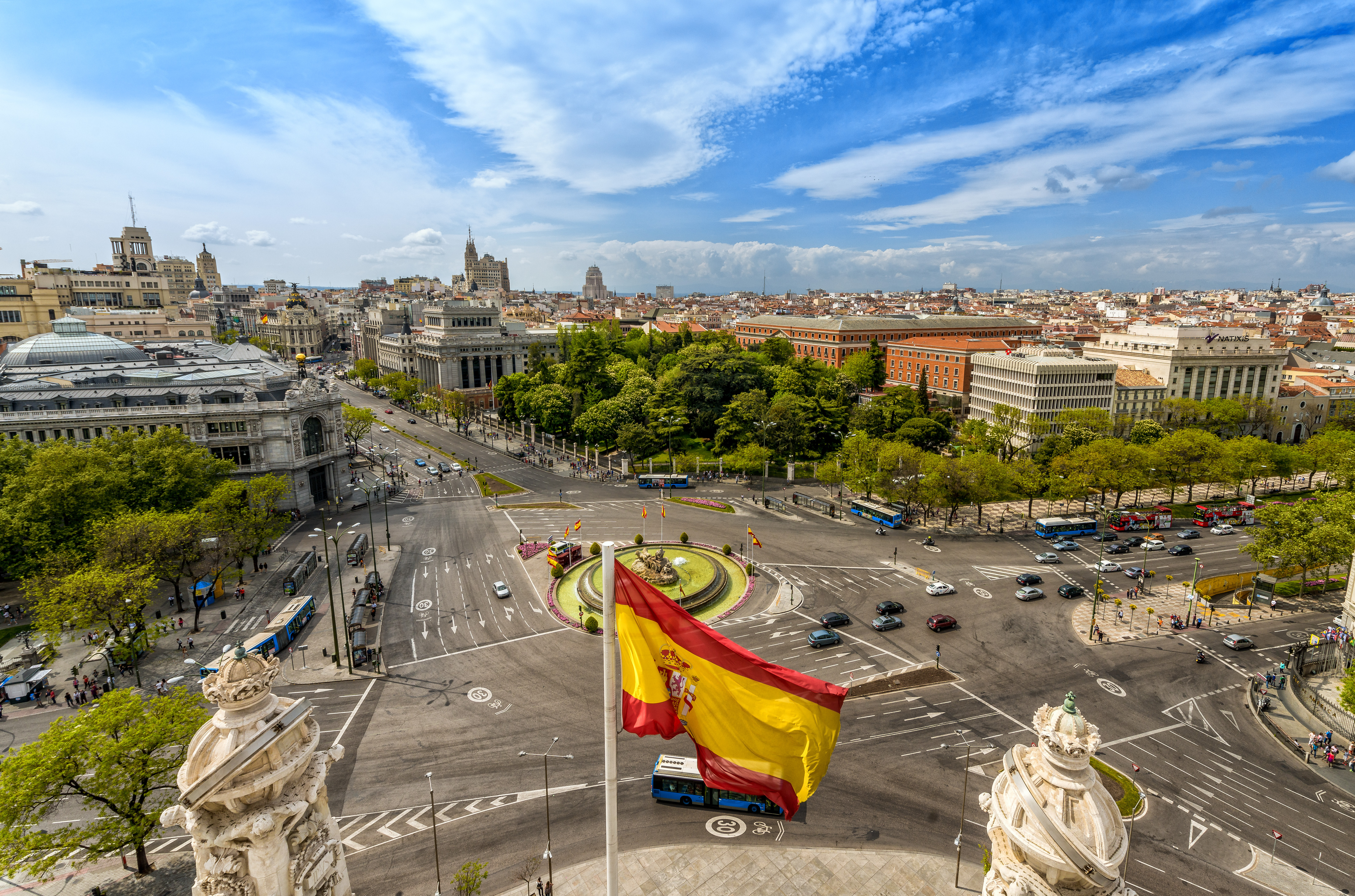 Plaza de Cibeles, Madrid, España.